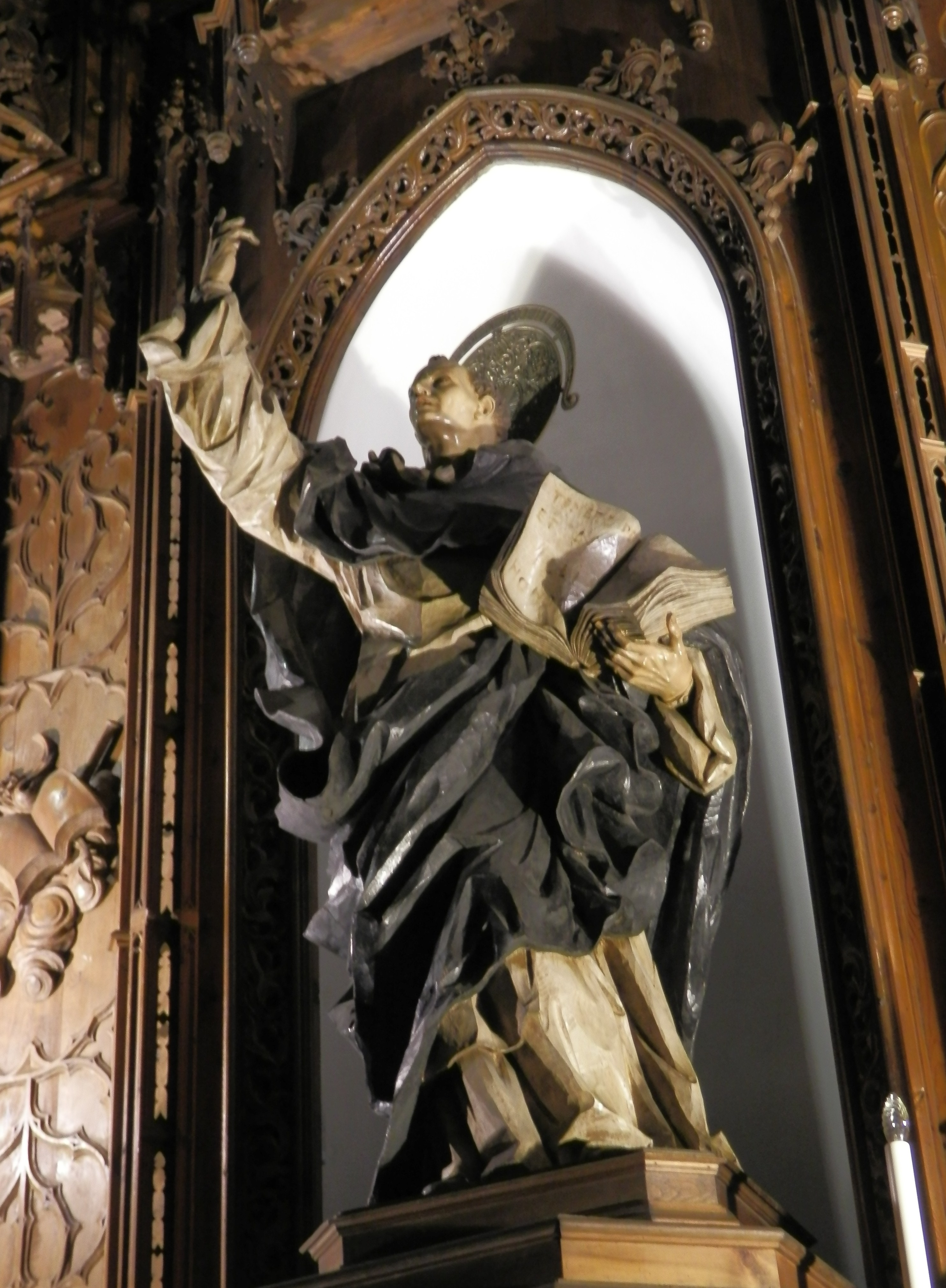 Estàtua de sant Vicent Ferrer a la seua casa natal.